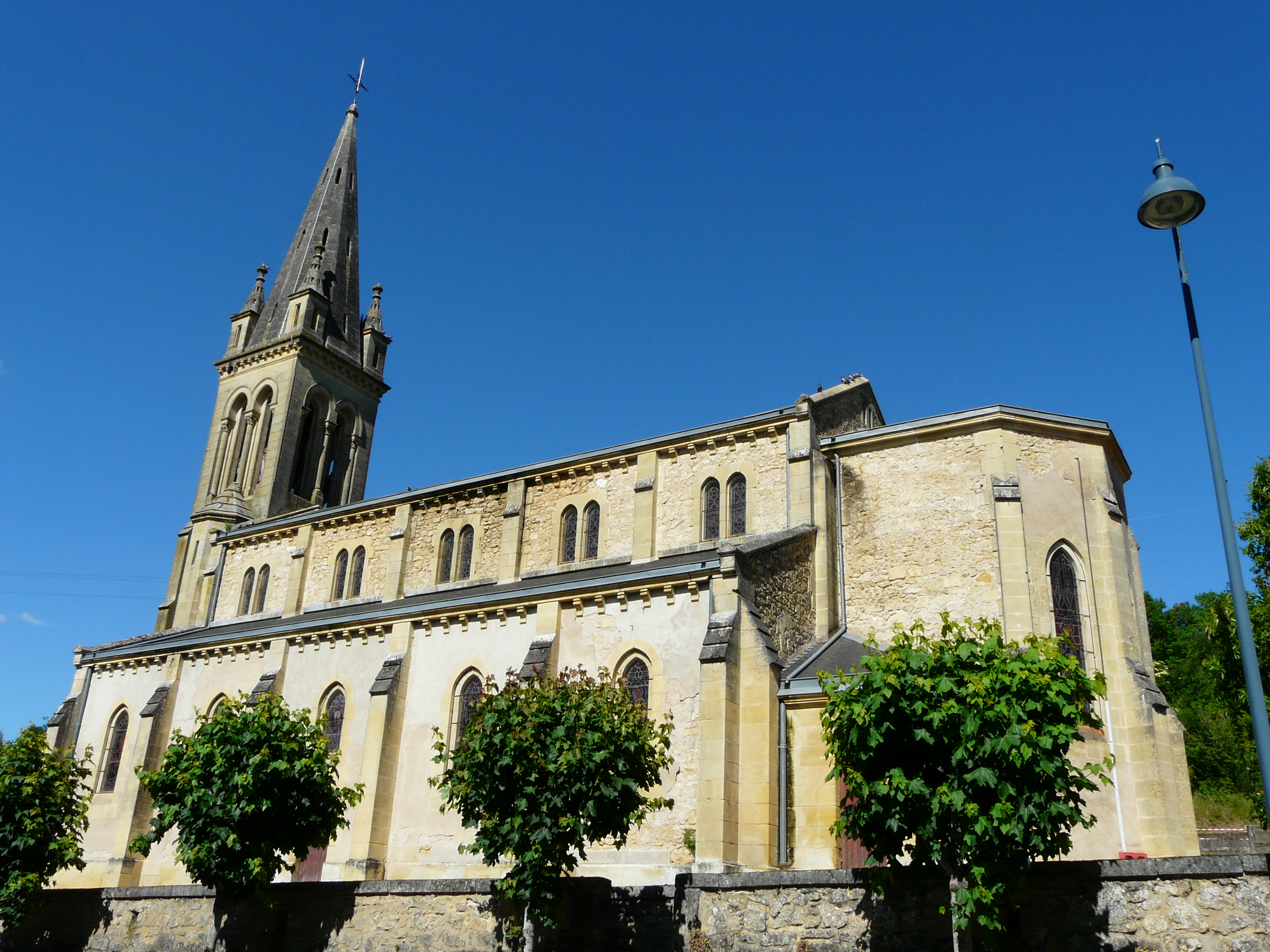 Le côté ouest de l'église Saint-Étienne, Couze-et-Saint-Front, Dordogne, France.